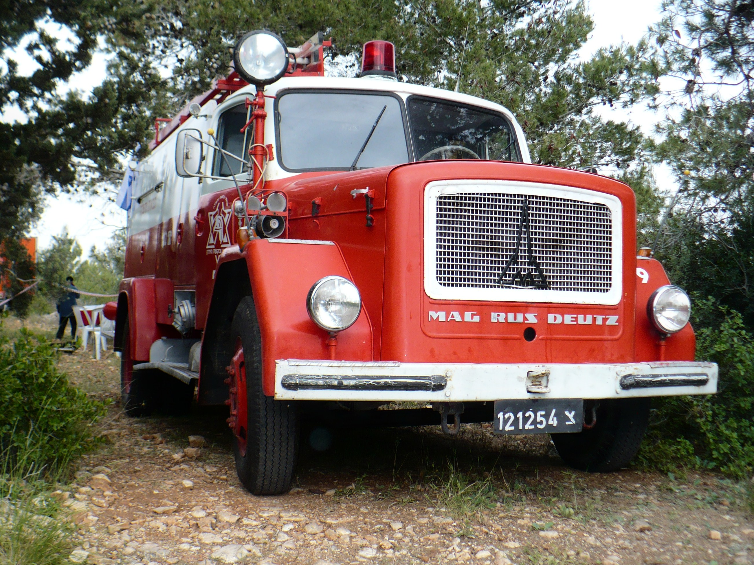 כבאית מסוג מגירוס המשמשת את תחנת בנימין, באבטחת אירוע יום העצמאות תש"ע ביער נווה-צוף